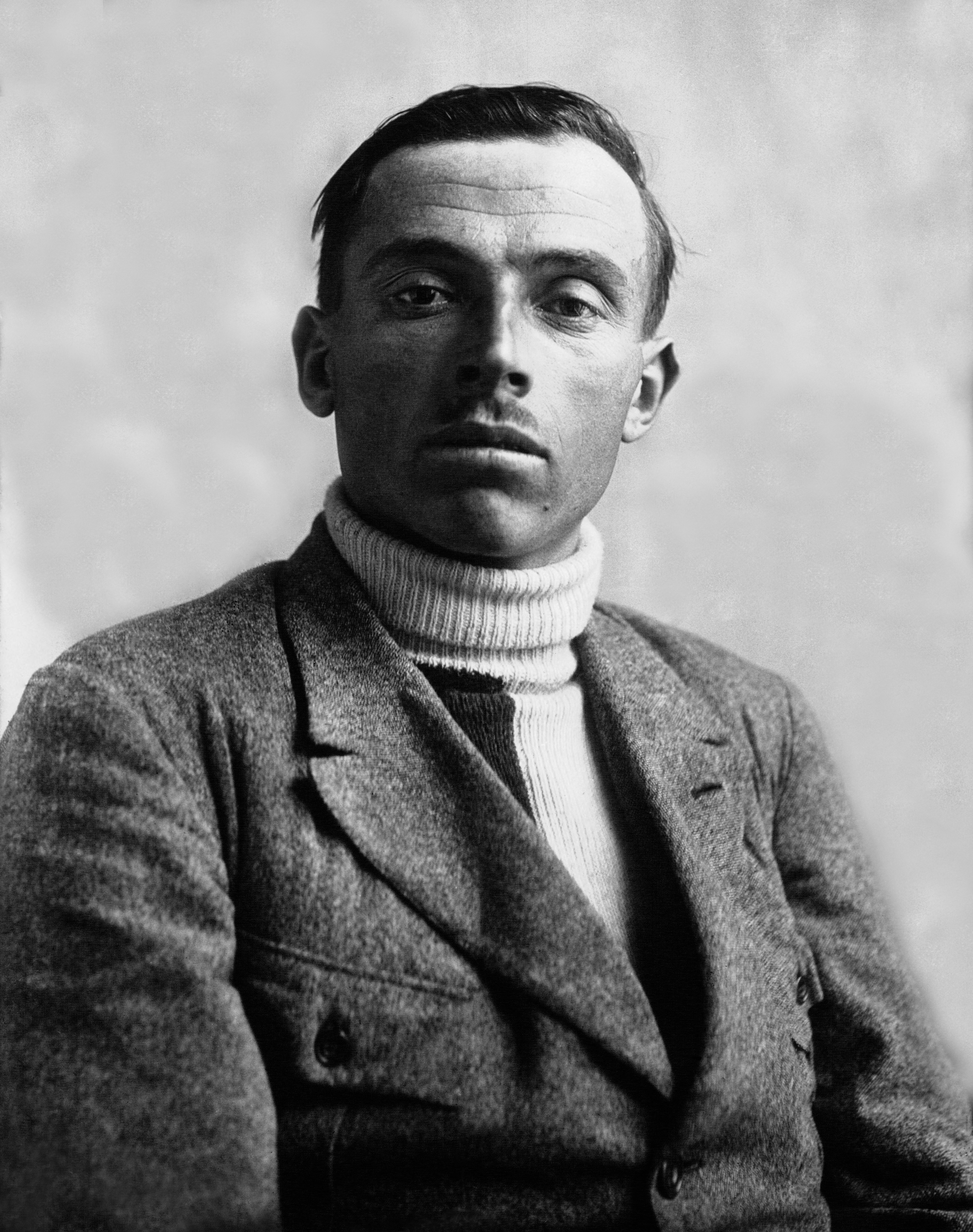 Portraits du Tour de France : Ottavio Bottechia.